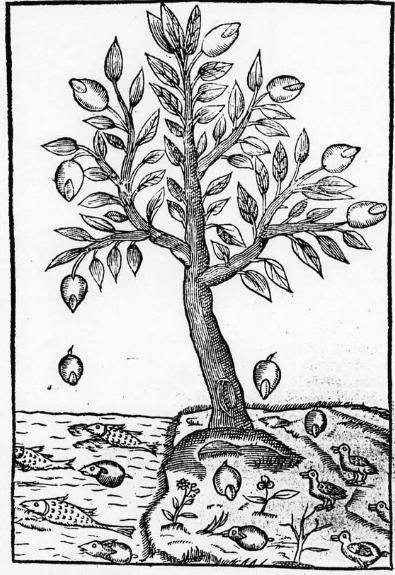 illustration d'Histoire Admirable des Plantes (1605) : feuilles se métamorphosant en poissons et en oiseaux.